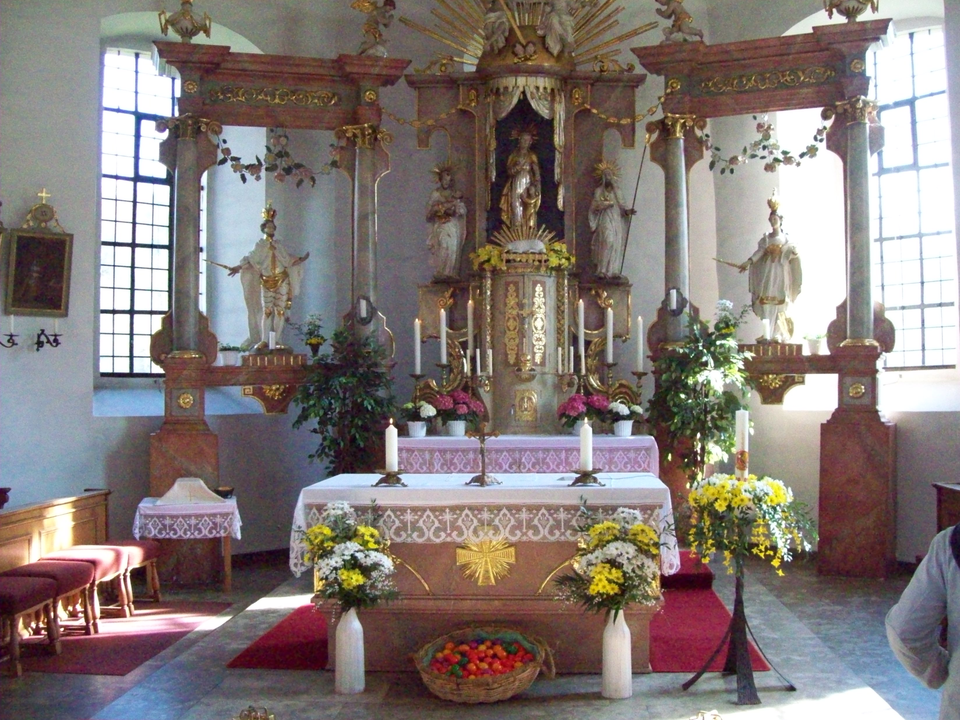 Chor der Kirche in Welitsch